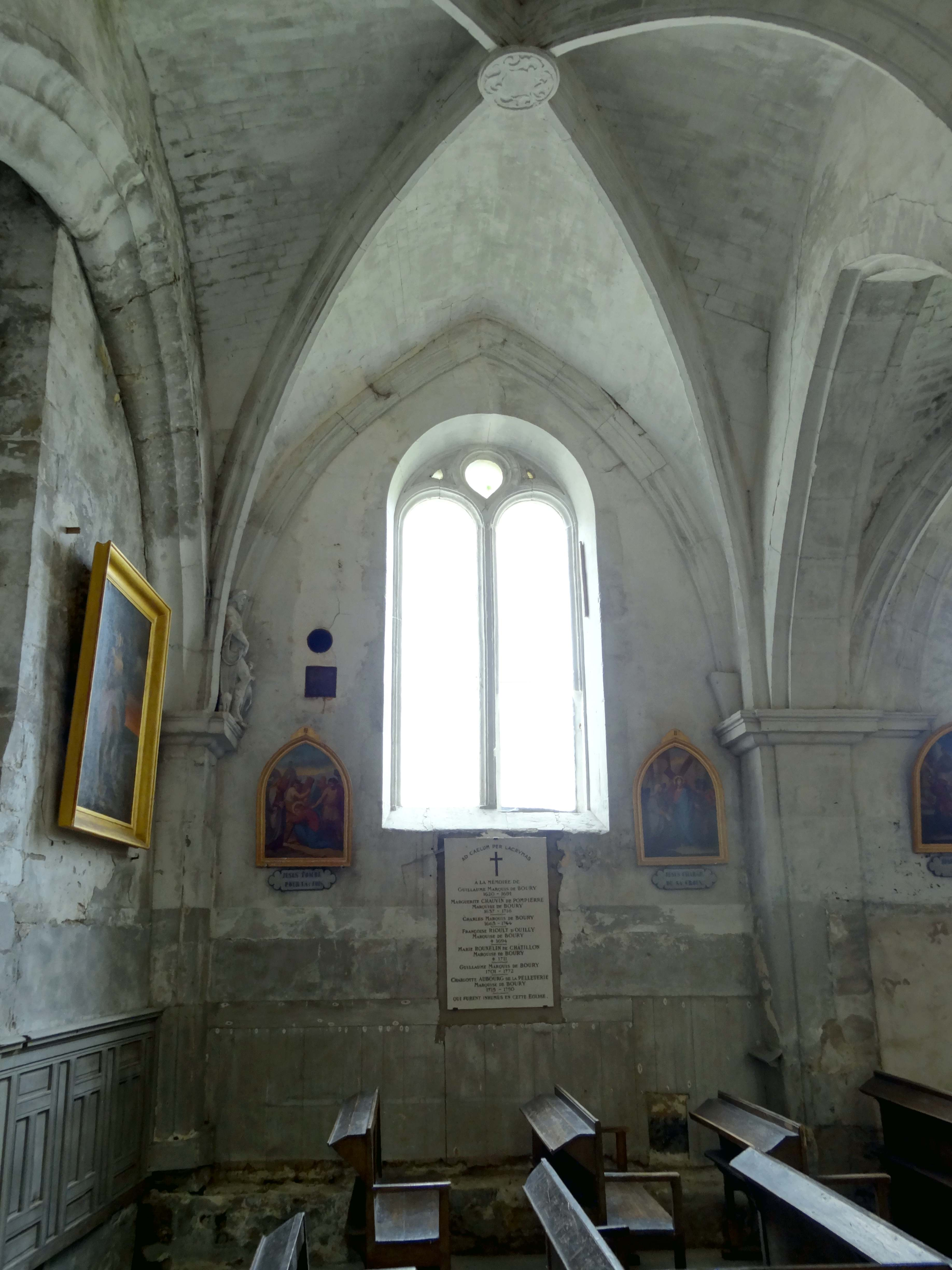 Intérieur de l'église - voir titre.